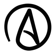 Símbolo del agnosticismo